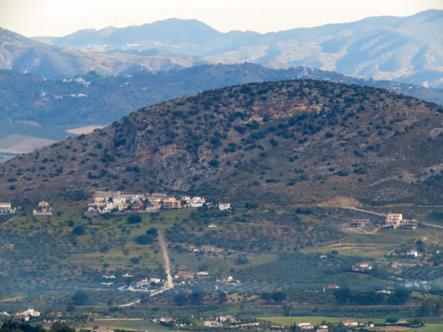 Alhaurín el Grande